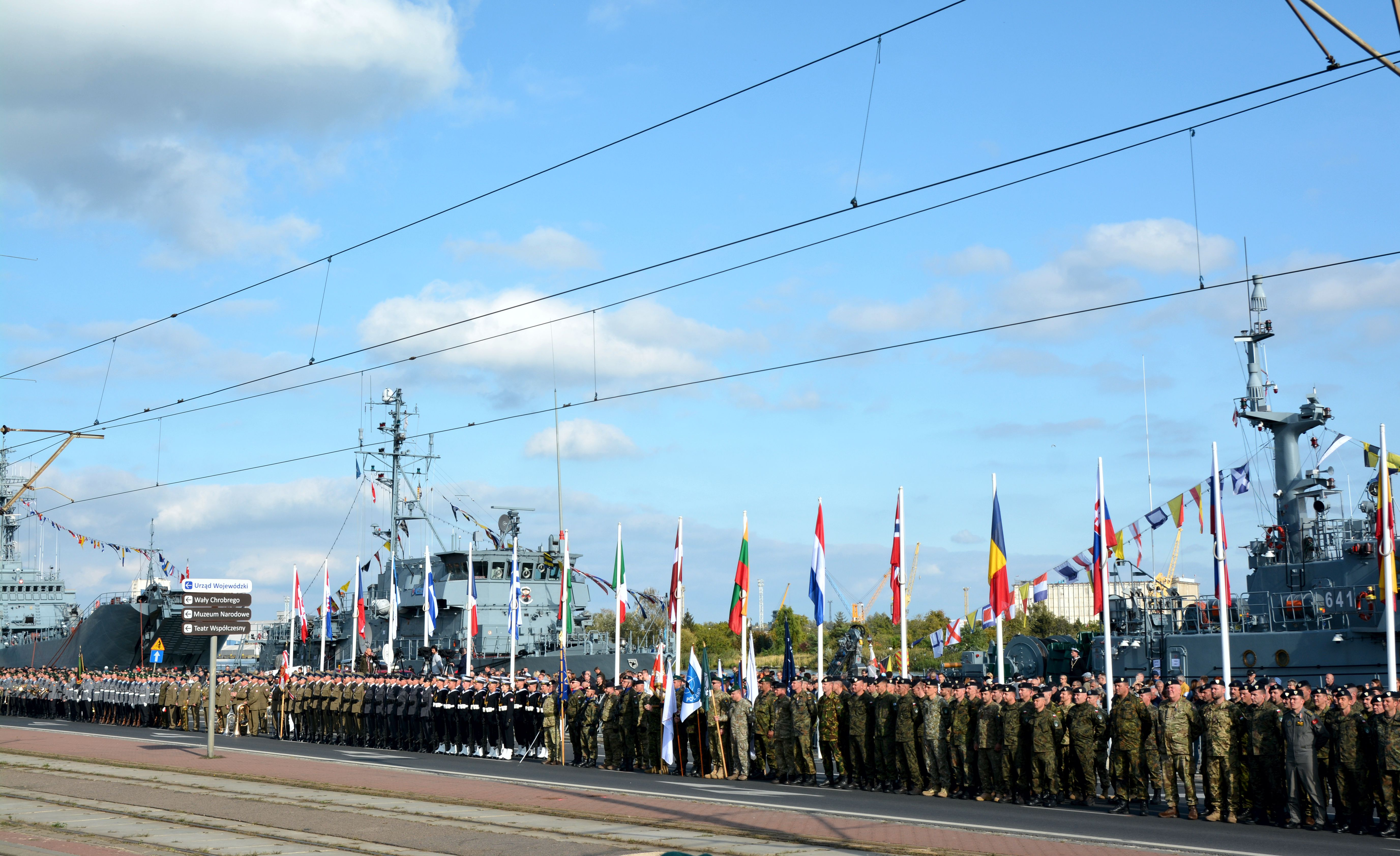 Obchody dwudziestolecia istnienia Wielonarodowego Korpusu Północno-Wschodniego; Szczecin, 21.09.2019 r.